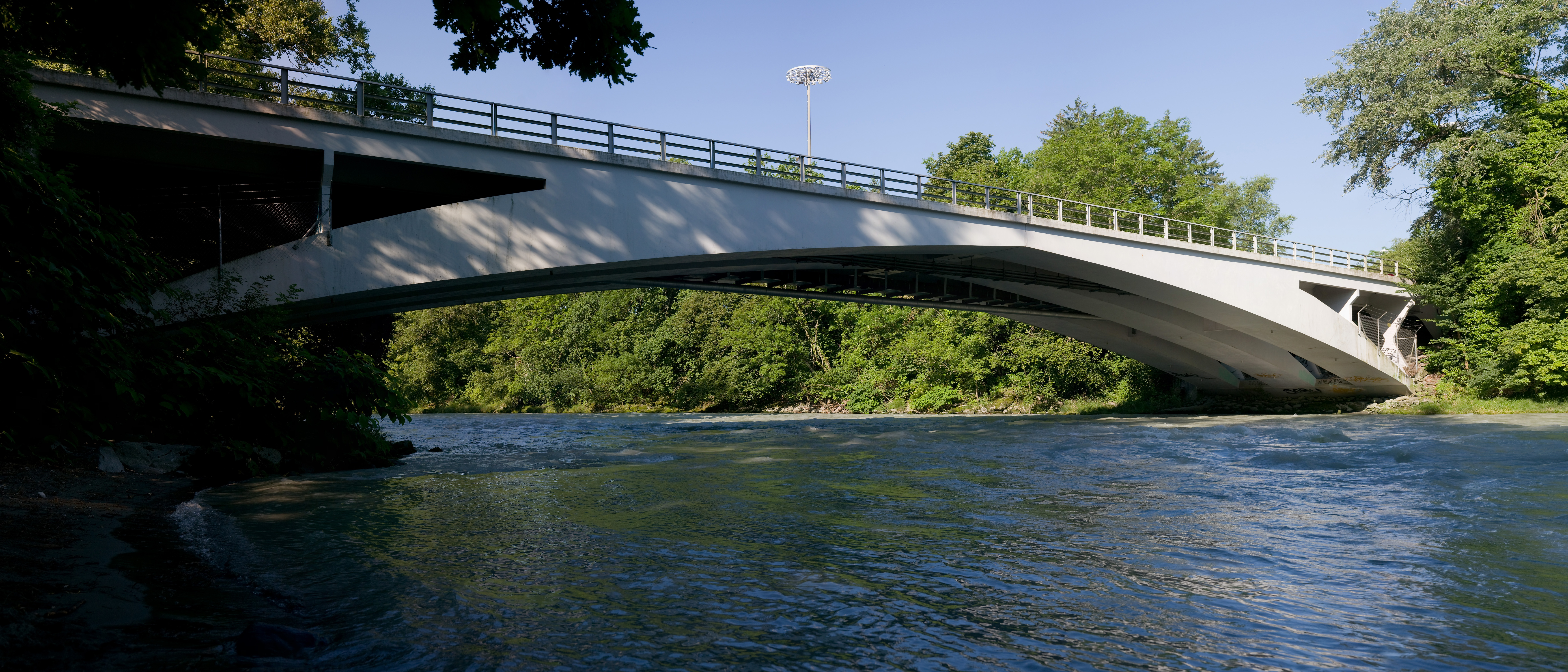 Robert Maillarts Arvebrücke aus Stahlbeton in Vessy, Gemeinde Veyrier, Schweiz